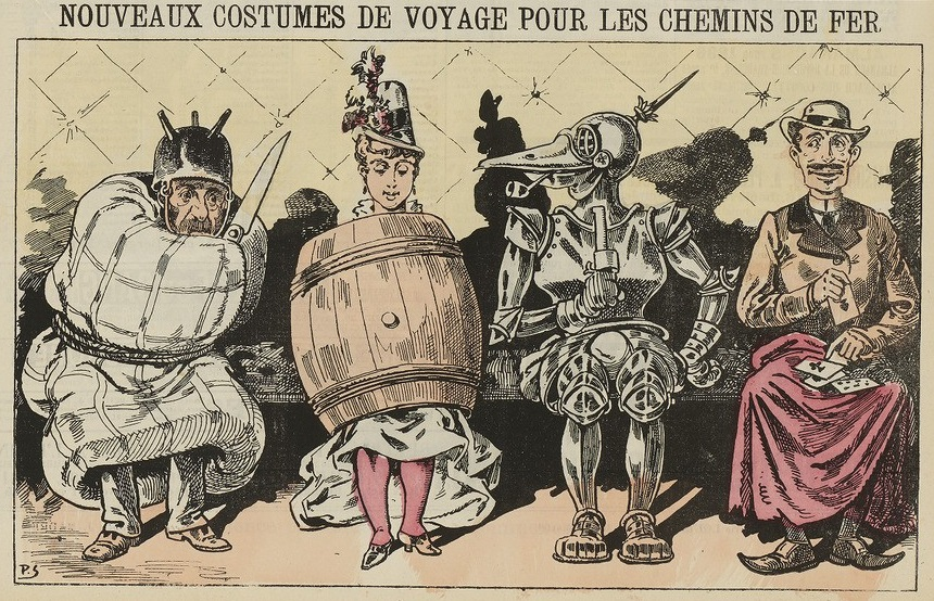 "Nouveaux costumes de voyage pour les chemins de fer".